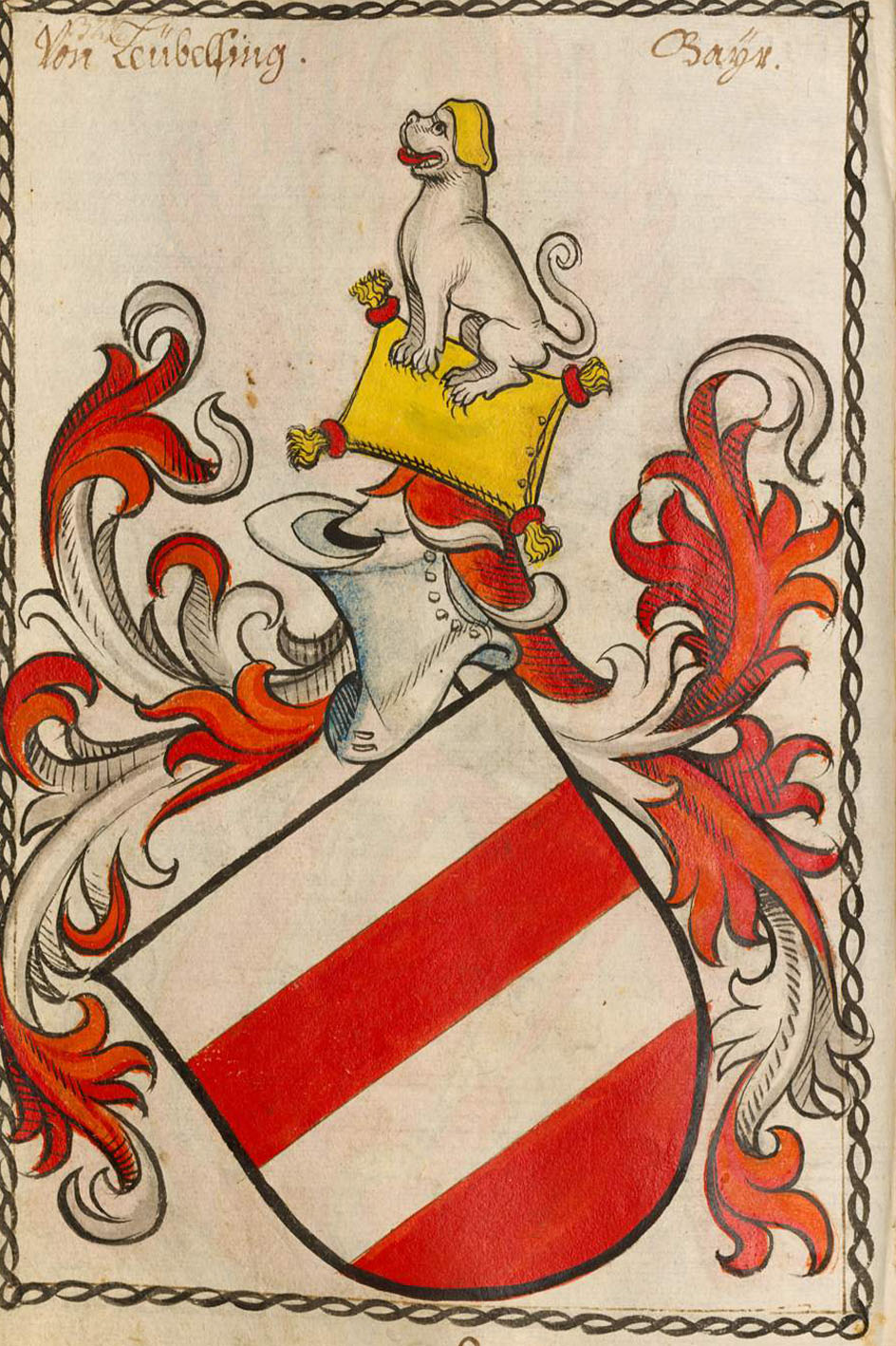 Scheibler'sches Wappenbuch , älterer Teil; Seite 322 Von Leubelfing Bayern